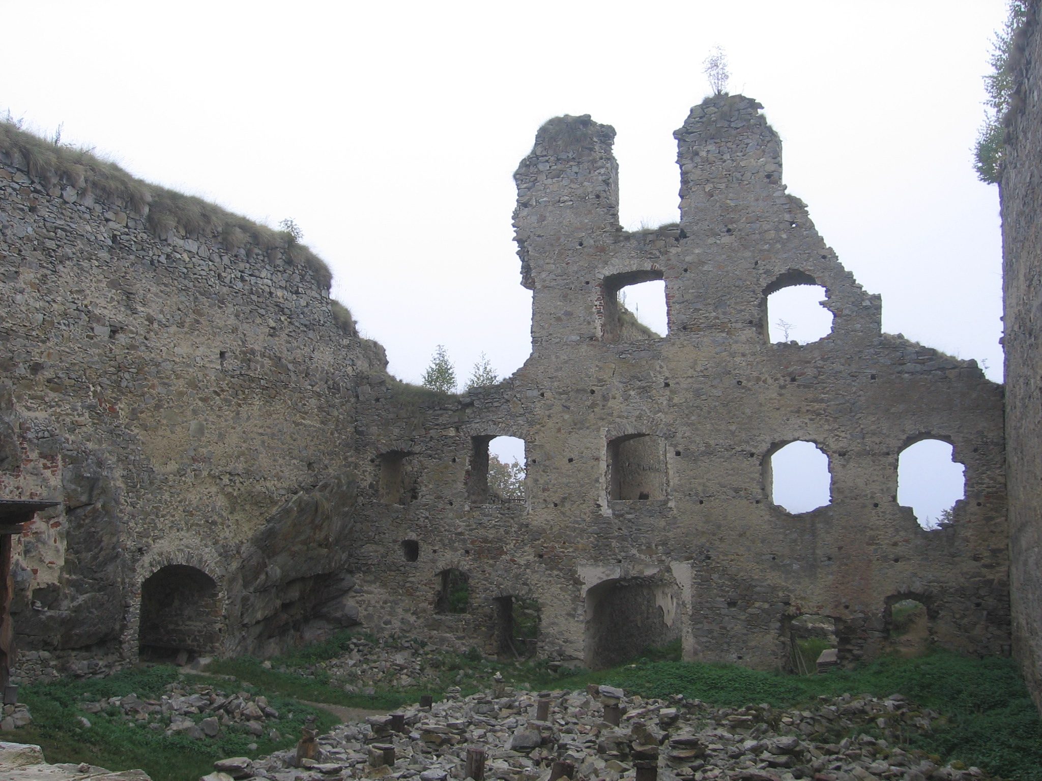 Dívčí kámen, ostrožna mezi Vltavou a Křemžským potokem, Křemže.